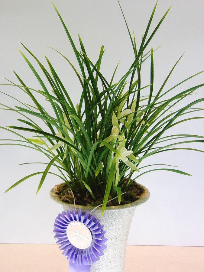 JGP2012【部門2】最優秀賞 Cym. goeringii 'Hakuun' 2012/02/19東京ドームにて撮影